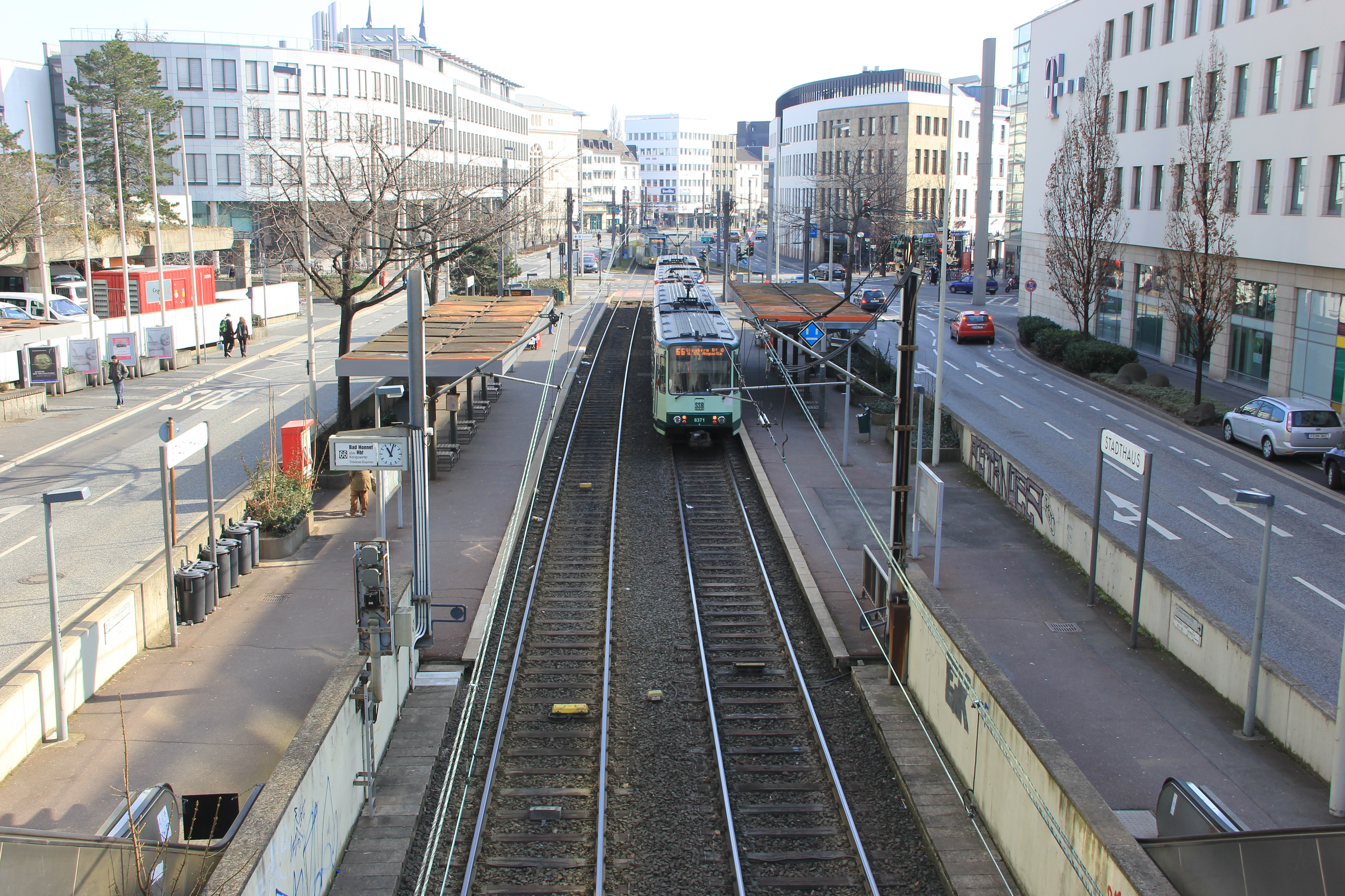 Stadtbahnhaltestelle Stadthaus, Bonn: Ansicht von der südlichen Zugangsrampe, der Stadthausbrücke.